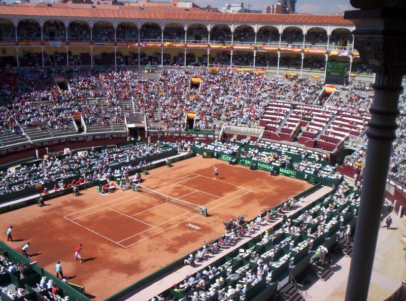 Semifinal Copa Davis '08 - Las Ventas